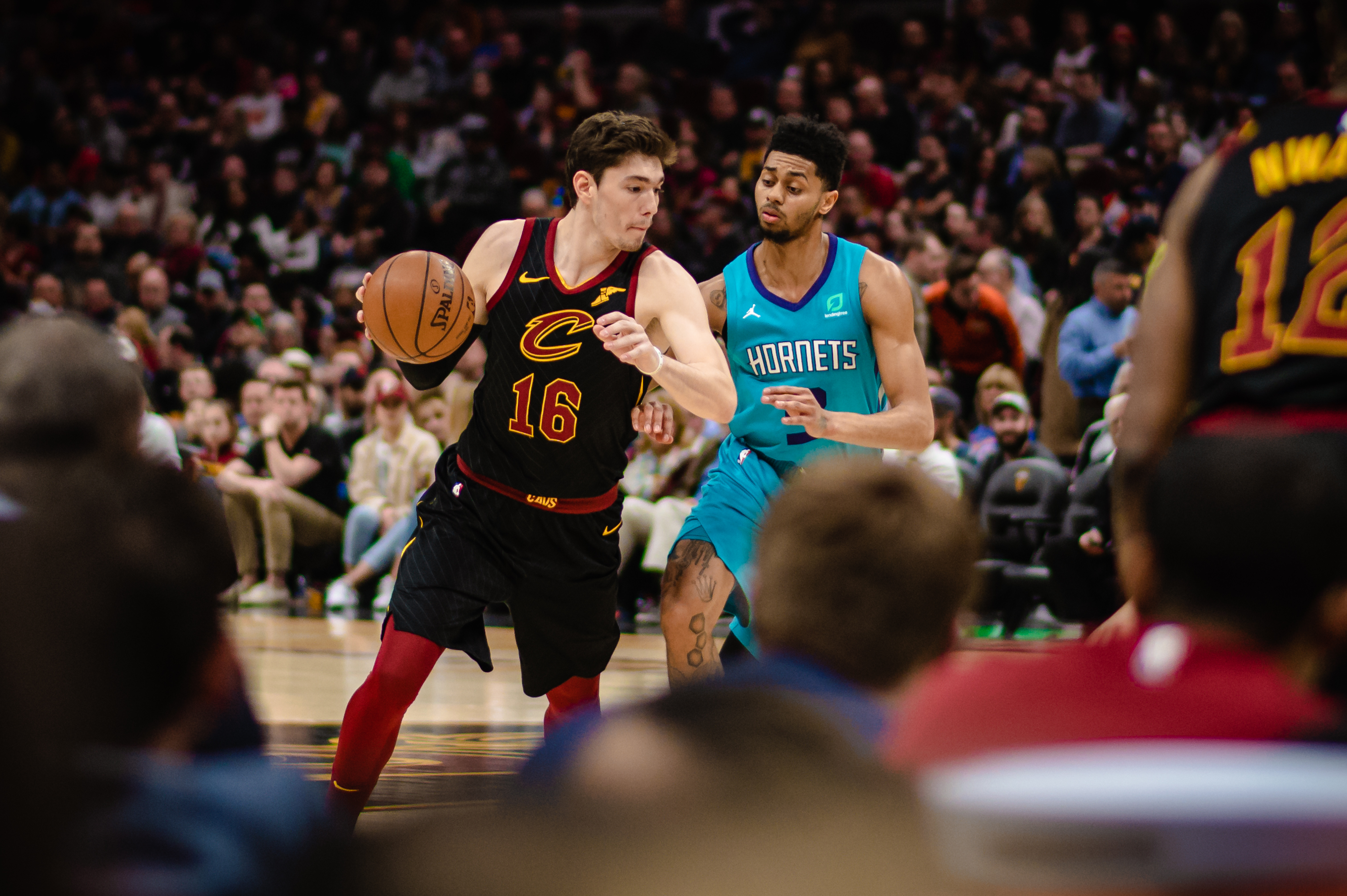 Cedi Osman